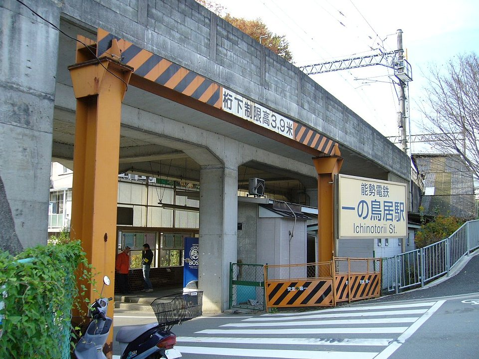 能勢電鉄一の鳥居駅 入口